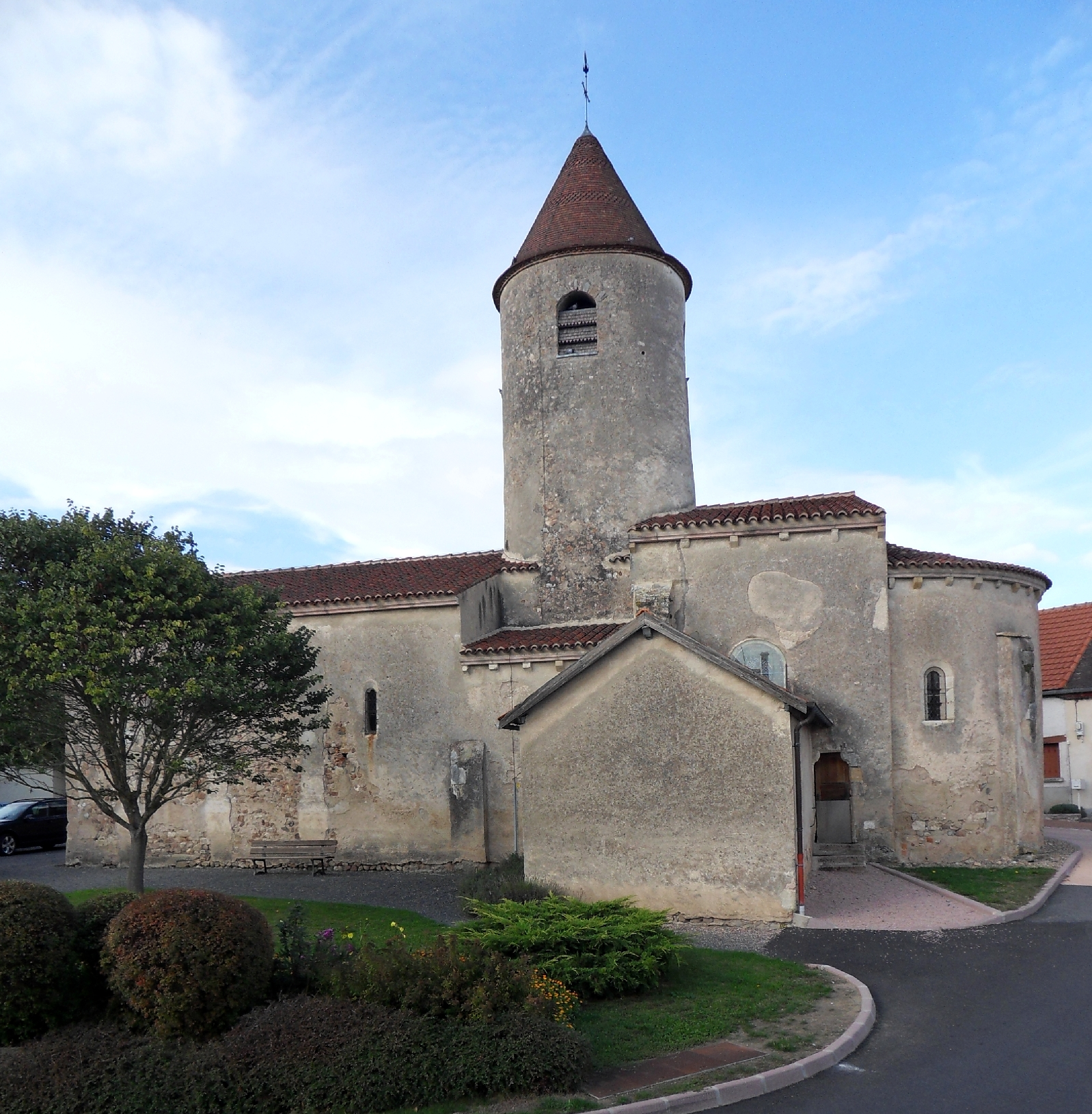 Église Saint-Étienne, (Classé, 1932) .